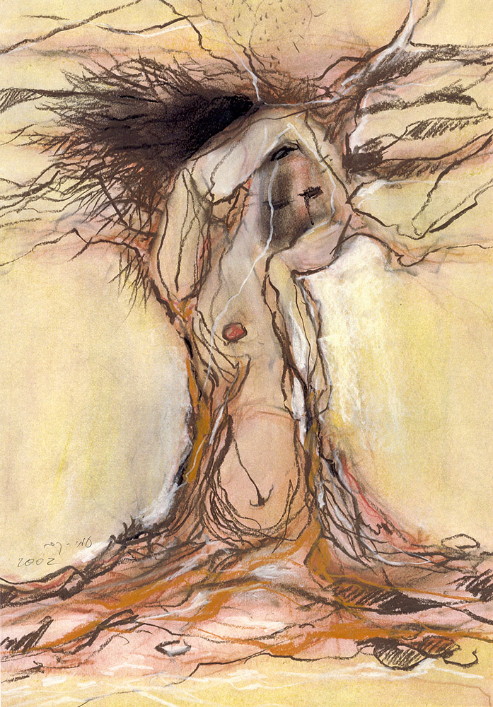 הצעקה - דימוי בוטני למאפיינים חברתיים רישום פסטל-גיר 2001 עמיקם בר גרמא